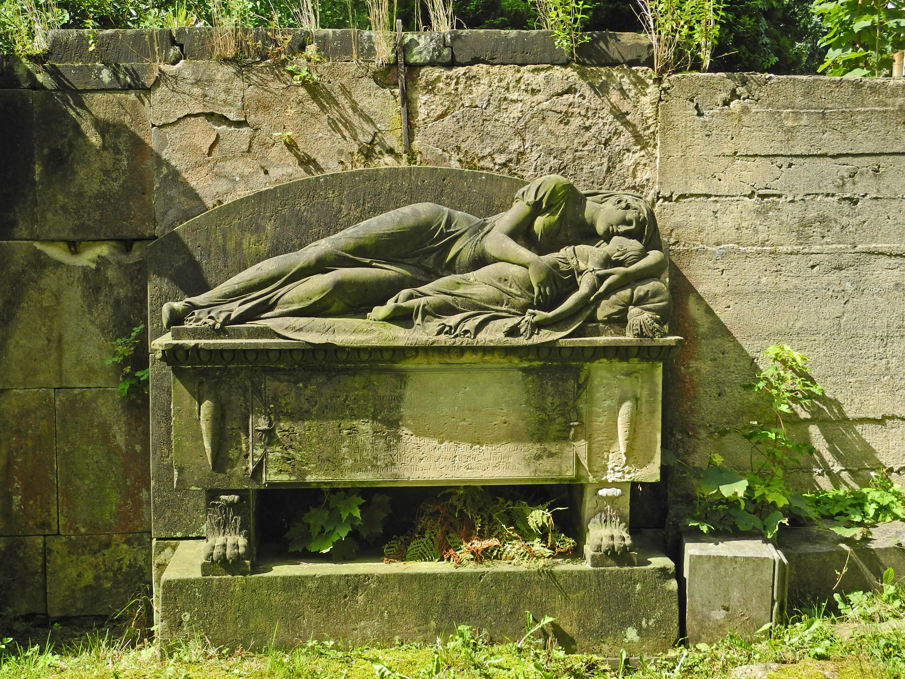 Grabmal Veronika Römisch und ihr Kind auf dem alten Kirchhof bei der Maria-Magdalenen-Kirche in Schönlinde (Krásná Lípa), geschaffen 1814 von Franz Pettrich (1770–1844).